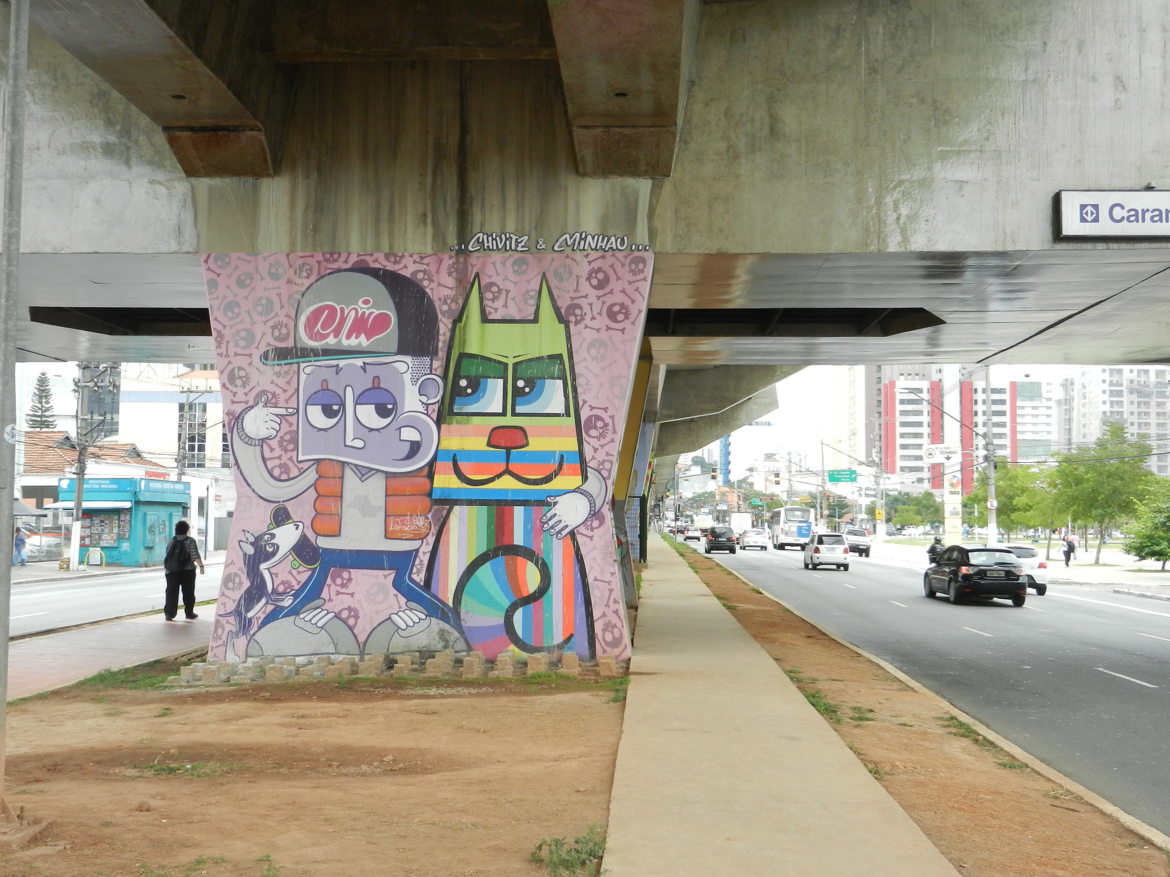 Painel grafitado no Museu Aberto de Arte Urbana de São Paulo.